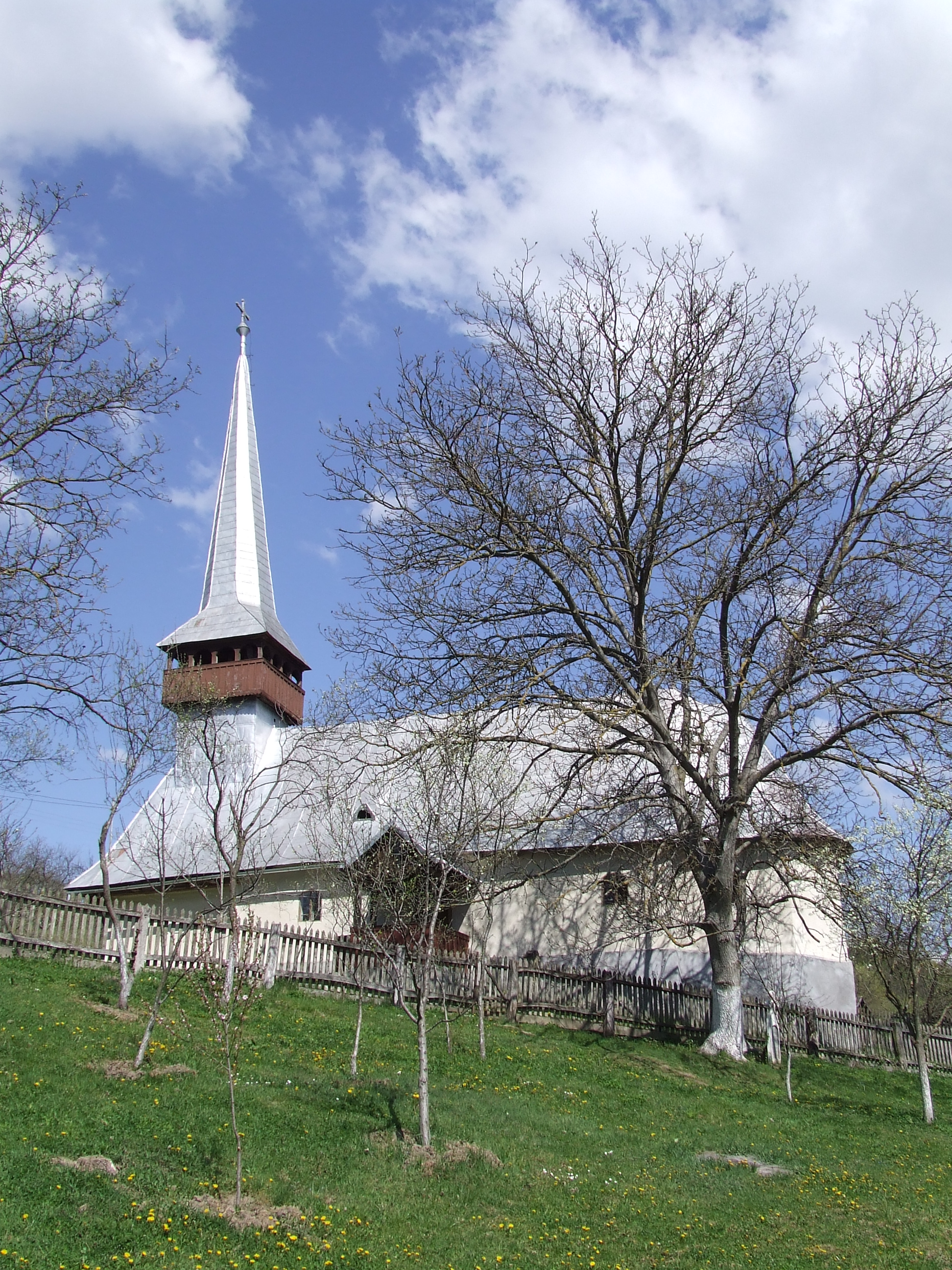 Biserica de lemn din Răstolţ, judeţul Sălaj. Autor: Bogdan Ilieş Data: mai 2007